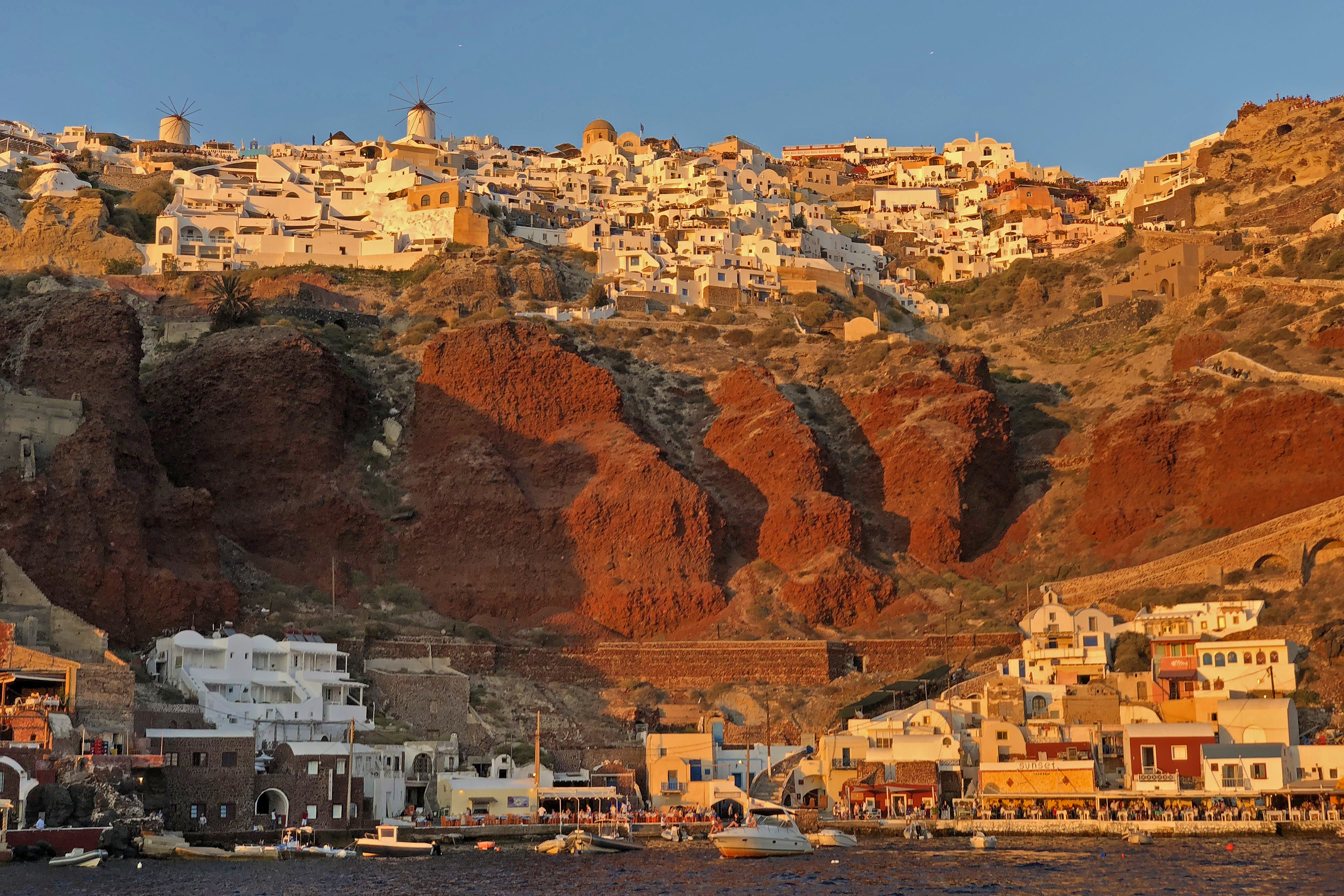 Vista di Oia e il suo porto dal battello. Santorini, Grecia, agosto 2018